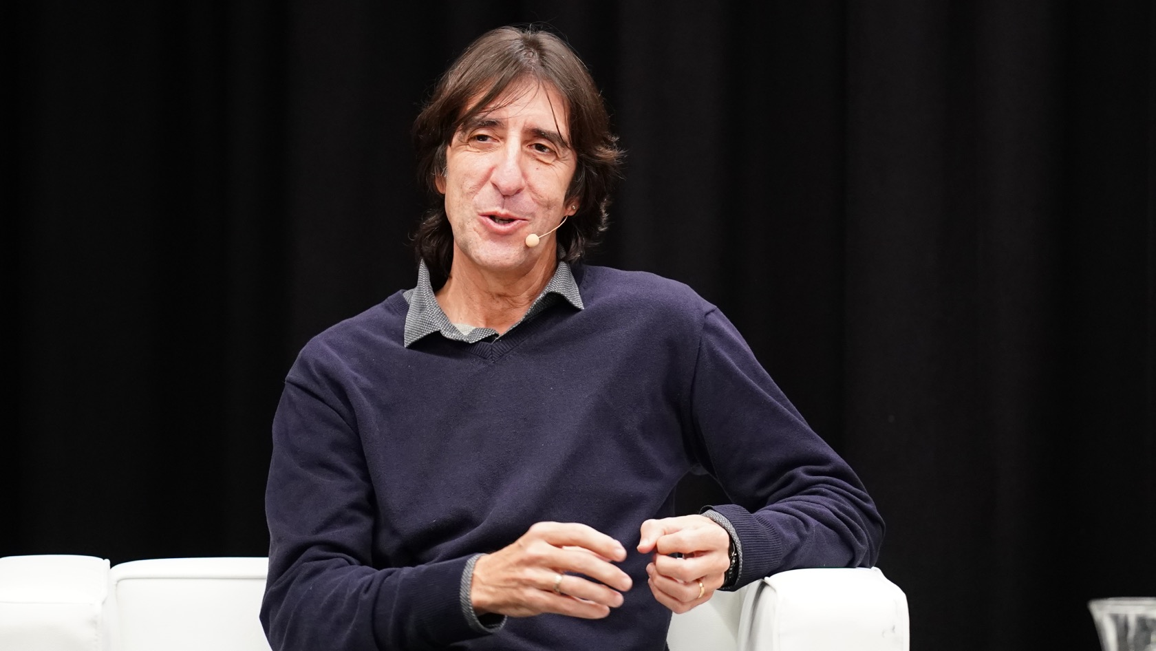 Korner 2020/02/12 Ernest Lluch K.E 19:30 Benjamín Prado, Manuel Vilas Antolatzailea: Donostia Kultura & Real Sociedad Fundazioa Argazkiak: Real Sociedad Fundazioa